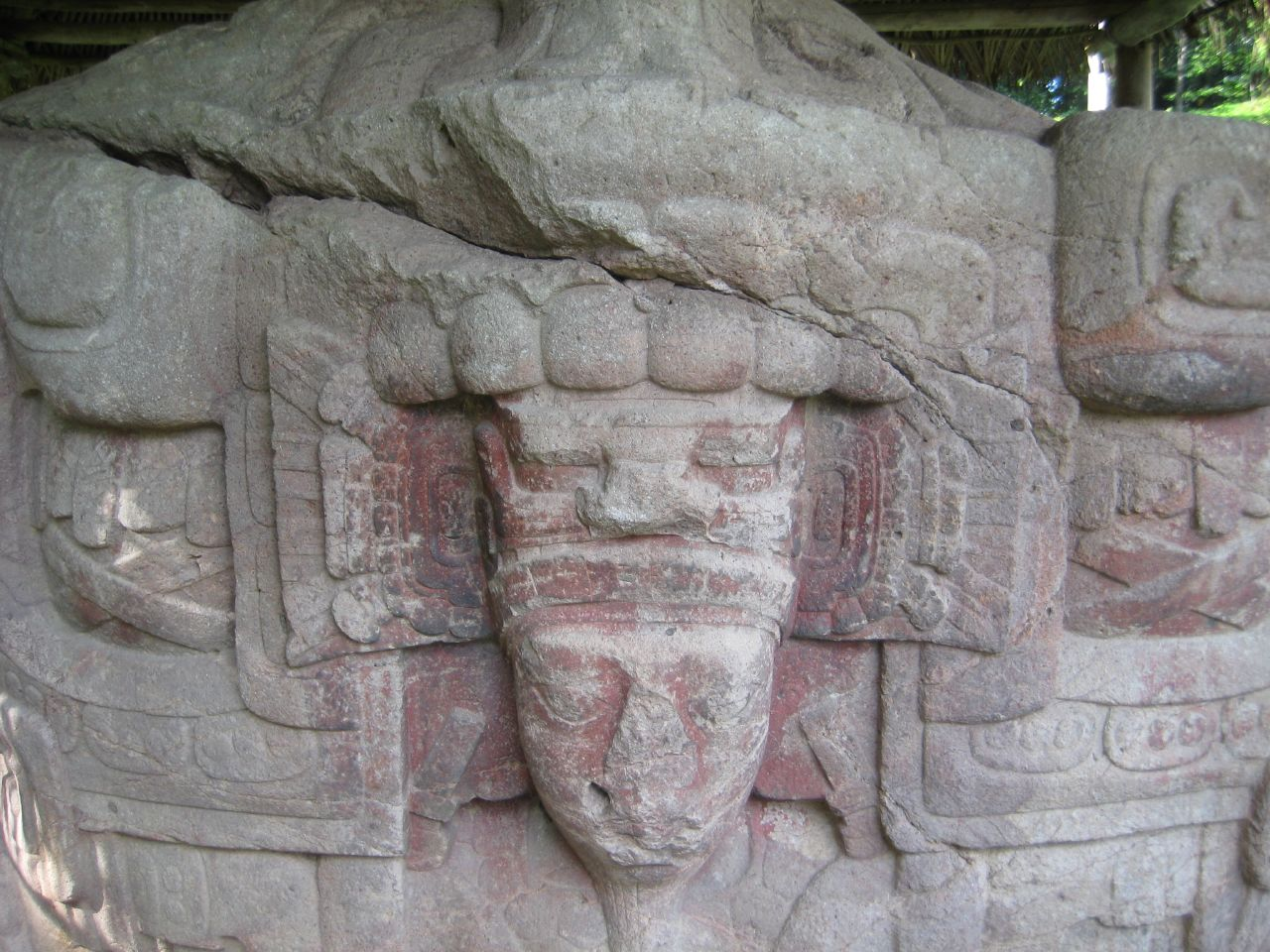 Maya ruins of Quirigua, Guatemala. Zoomorph B